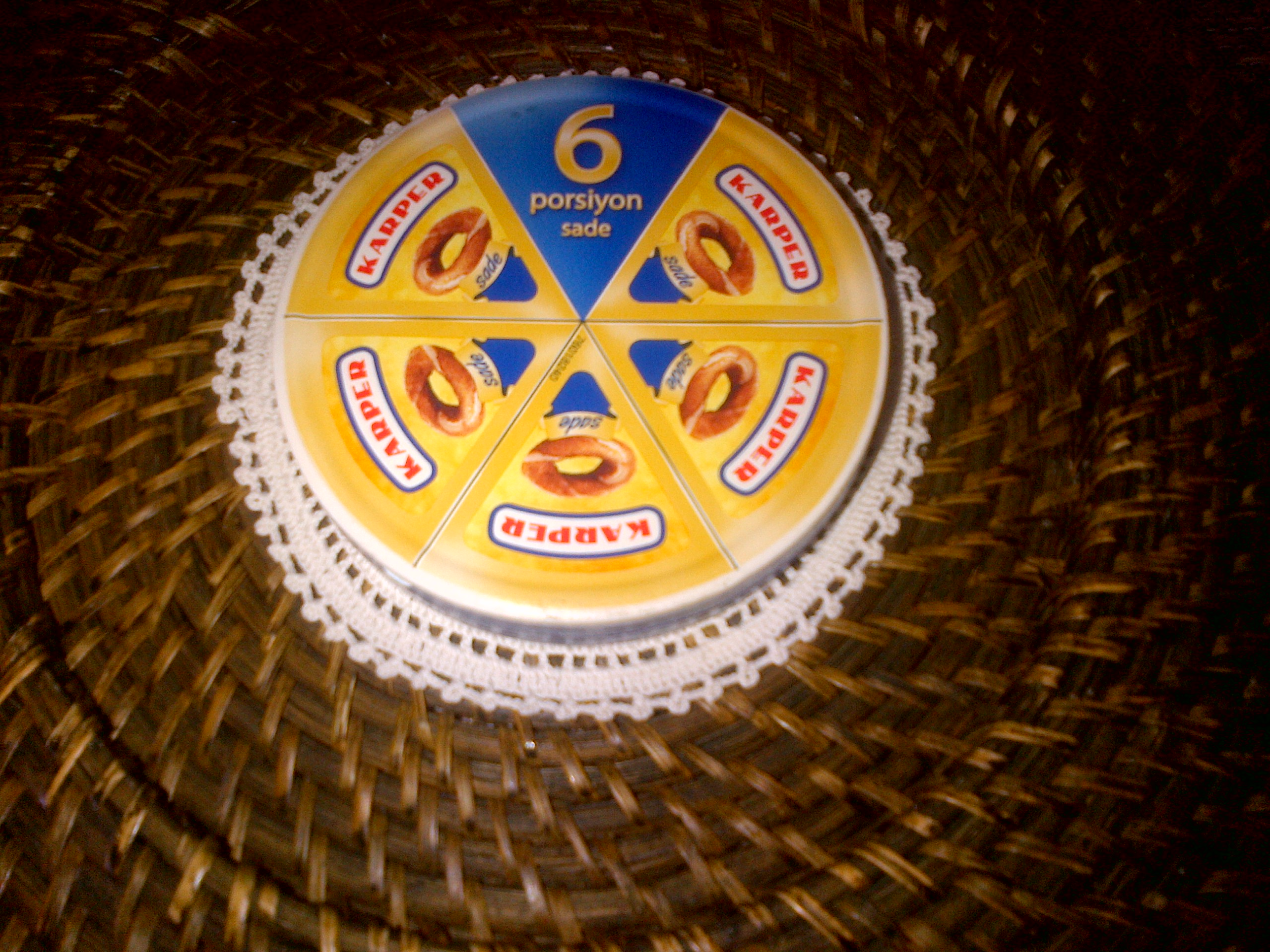 "Karper", un queso suave, casi cremoso empaquetado en triangulitos individuales, es el mejor aliado del "simit" en la comida callejera de Turquia.